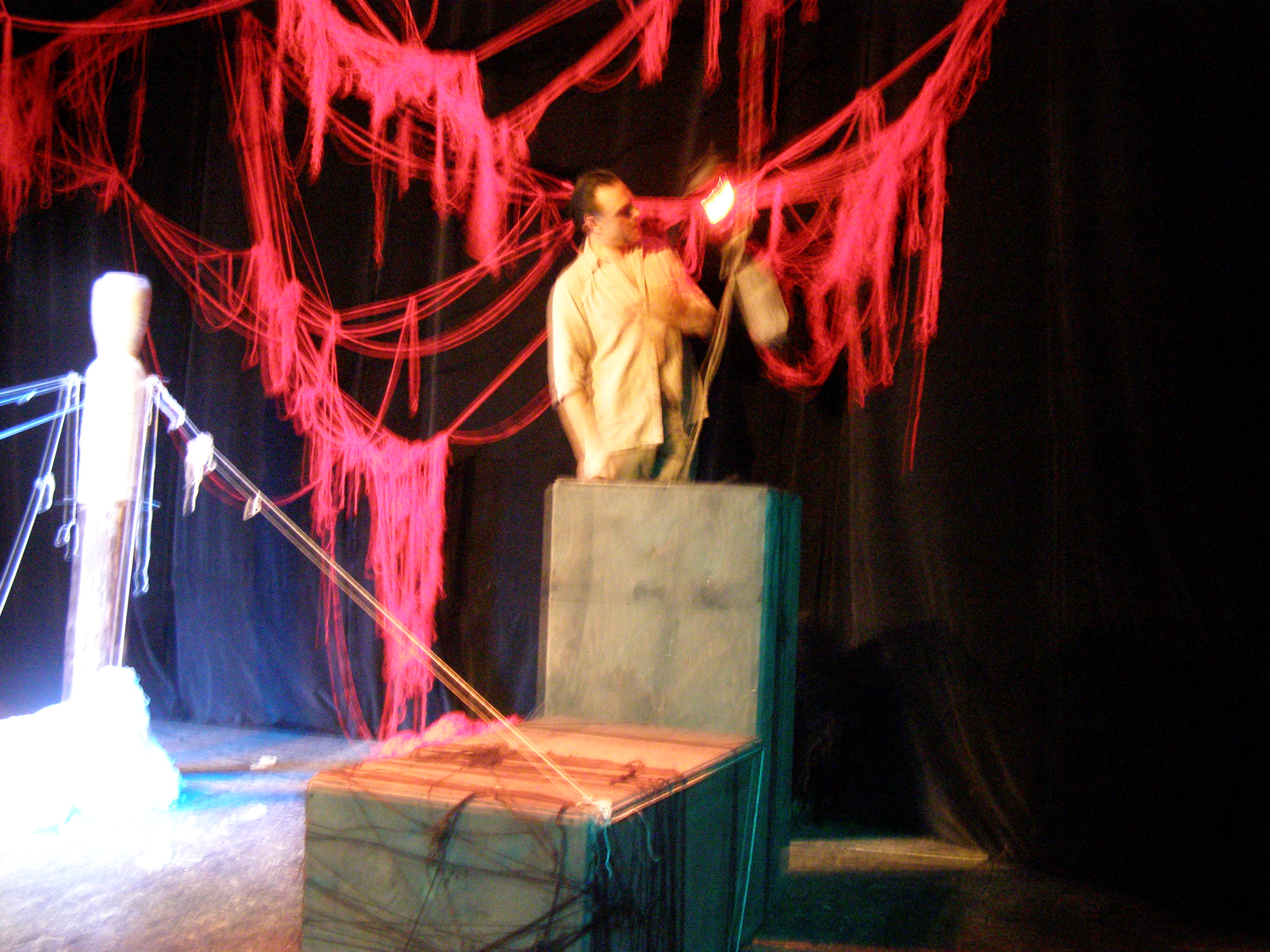 Народний артист України Мельник Михайло Васильович, Академічний український театр одного актора «Крик», вистава «Дикий»